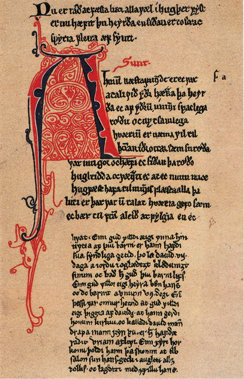 Side fra Kongespeilet.